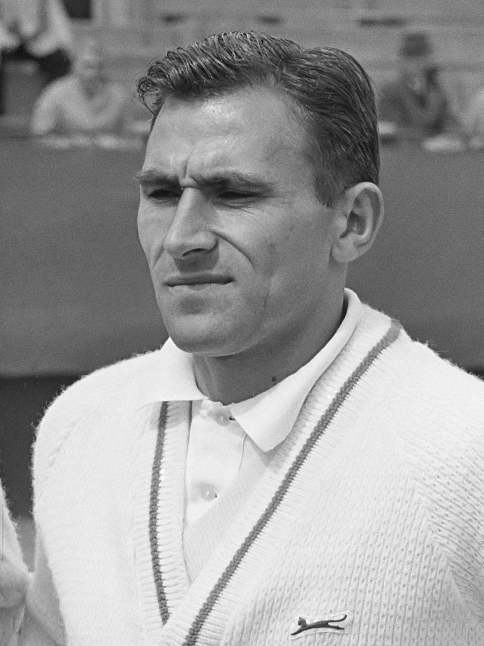 Davis Cup Nederland tegen Hongarije, Tom Okker en Gulyas, close-up 1 mei 1964